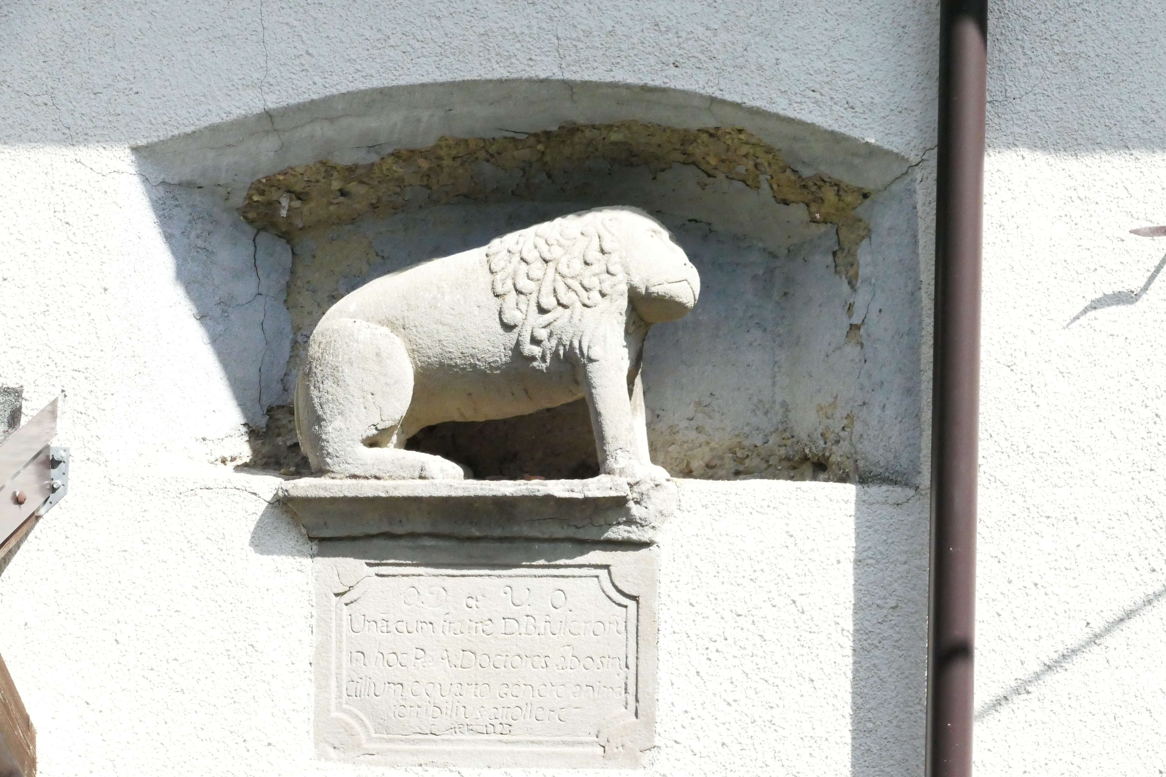 Scultura zoomorfa appennino reggiano